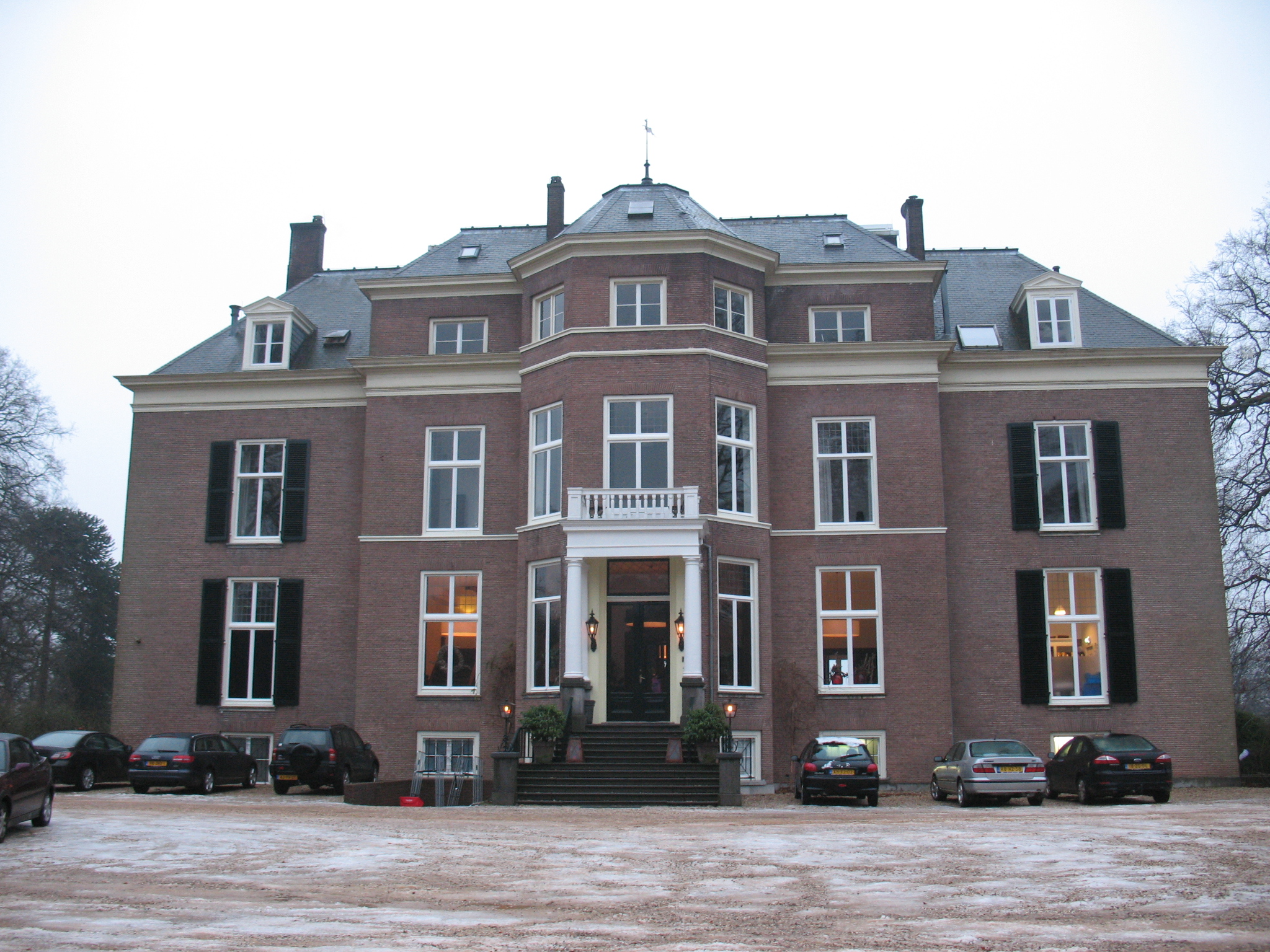 Huis Rhederoord, De Steeg